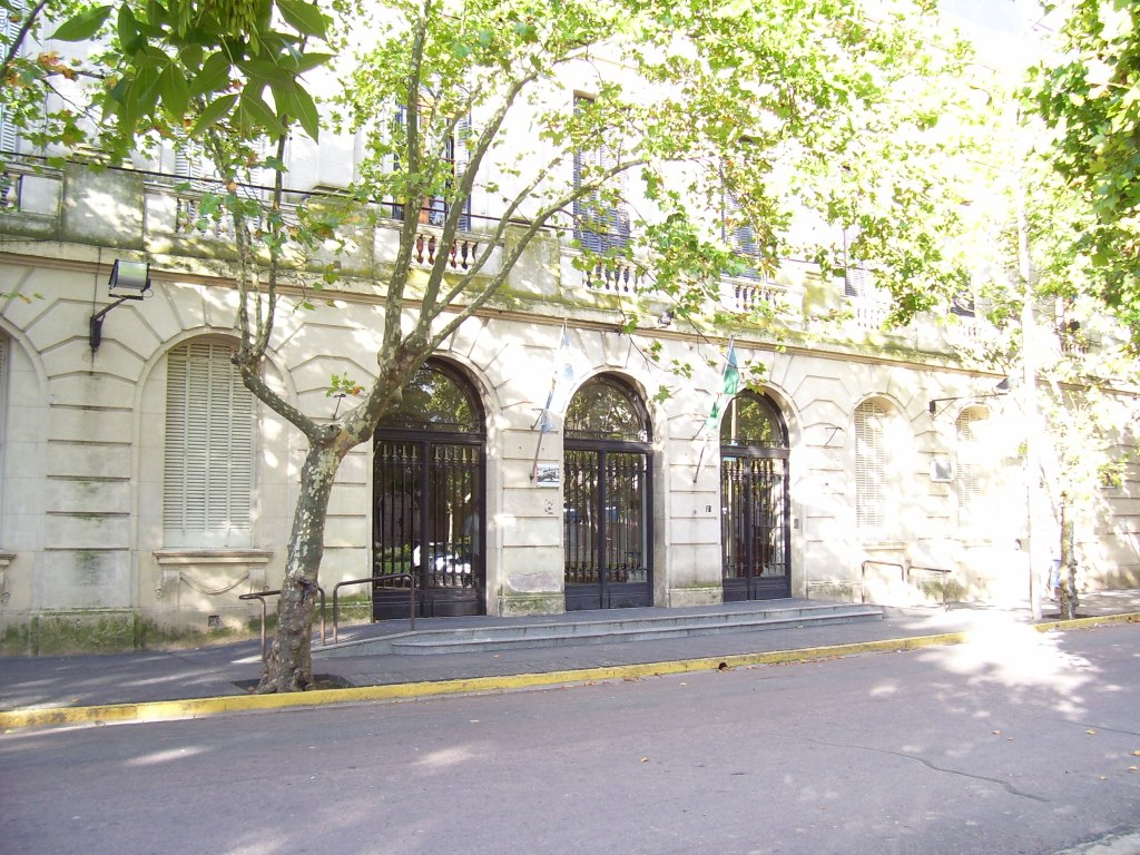 La Municipalidad de Pergamino.